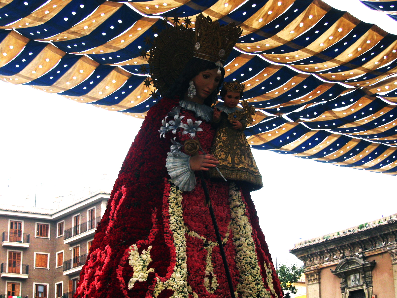 Virgen de los desamparados in València, Spain